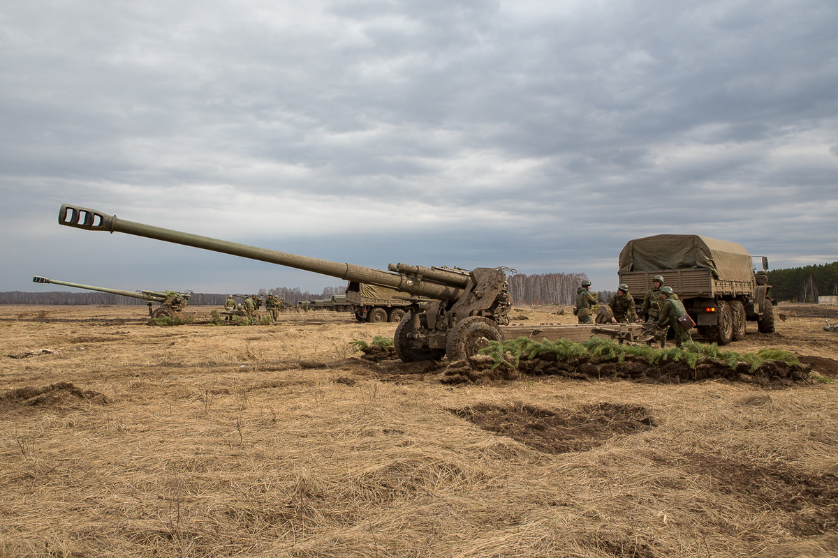 2А65 «Мста-Б» 120-й гвардейской артиллерийской бригады.